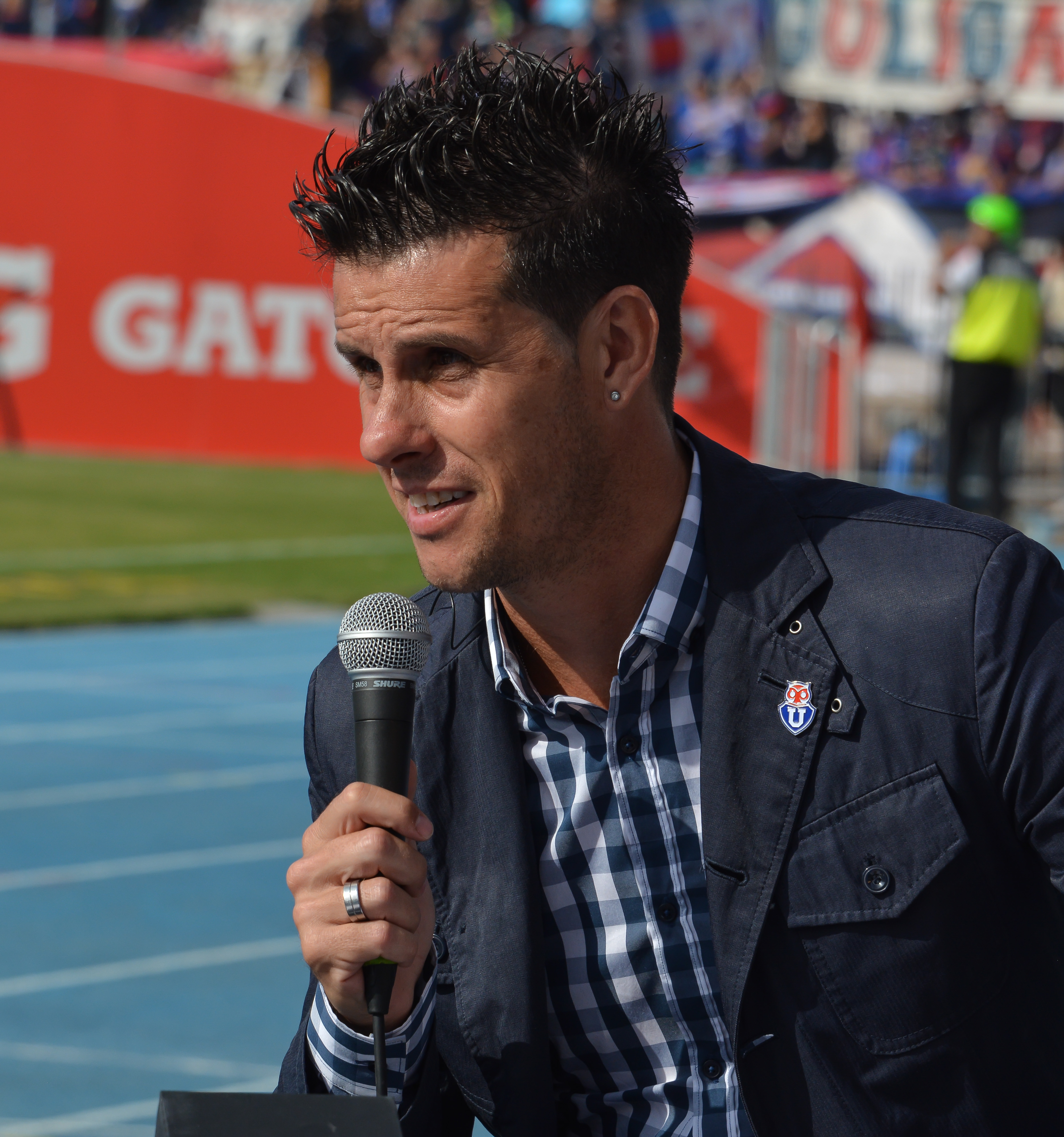 Diego Rivarola, Universidad de Chile v Colo-Colo, Estadio Nacional, Santiago, Chile.